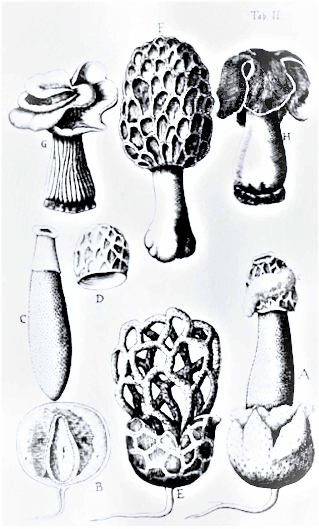 Giovanni Antonio Battarra, in: „Fungorum Agri Ariminensis Historia”, tab. II (Ascomycota), 1775